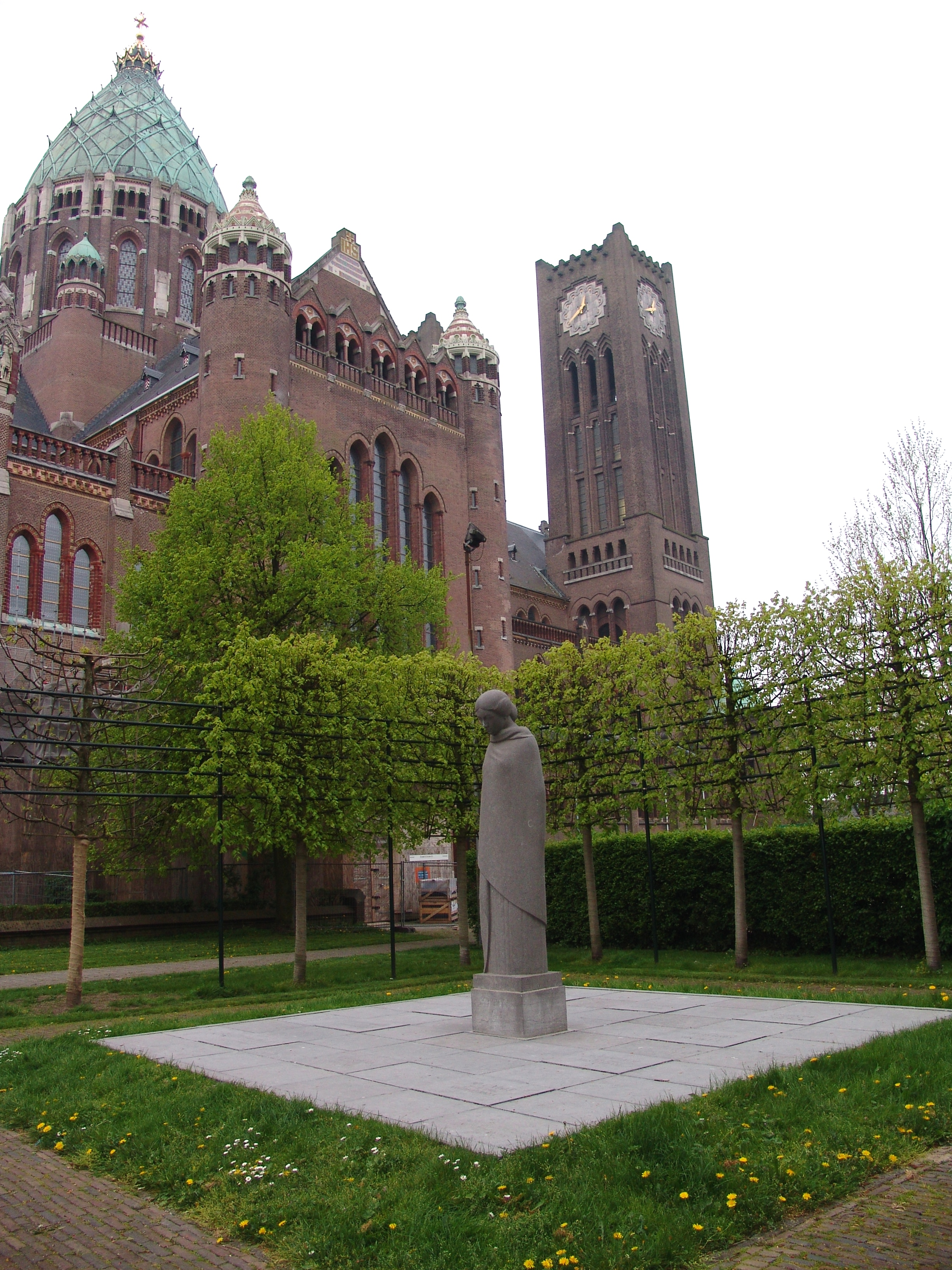 Haarlem, Westergracht Treurende vrouw In oktober 1944 besloot het Haarlems verzet om Fake Krist te liquideren. Deze Haarlemse politieman was levensgevaarlijk. Men wist dat hij lijsten op zak had met Haarlemmers die opgepakt moesten worden. De meesten zouden het er dan niet levend afbrengen. Krist was in de kost bij NSB-ers aan de Westergracht. Dagelijks vertrok hij van daar op een vaste tijd per fiets naar zijn bureau. Besloten werd Krist neer te schieten vanuit de Bavoschool, tegenover de kathedraal. Een klus voor Zwarte Kees, een van de beste schutters in de verzets-knokploeg. Samen met twee anderen verschanste hij zich op 25 oktober heel vroeg in de school, in de gymzaal op de 1e etage, achter een raam op hoek van de Leidsezijstraat. Het schoolhoofd had hen de sleutels bezorgd. Toen Krist op de fiets kwam aangereden richtte Zwarte Kees zijn karabijn en schoot. Het eerste schot schampte af op de koppel van Krist, maar de volgende twee troffen hem dodelijk. De Duitsers namen onmiddellijk wraak. Naast de school werden vier woningen ontruimd en in brand gestoken. De bewoners kregen nauwelijks tijd om hun huis te verlaten. Bovendien haalden de Duitsers 10 arrestanten op uit de gevangenis aan de Amsterdamse Weteringschans. Deze verzetsmensen werden als vergelding op 26 oktober 1944 in het openbaar aan de Westergracht gefusilleerd. Als gedenkteken staat daar sinds 1949 in het plantsoen naast de kerk "Treurende vrouw", een beeld van Ludwig Oswald Wenckebach (1895-1962). Het herinnert ons aan de tien slachtoffers: W. de Boer (26 jaar) W. Böhler (49 jaar) C. Erends (32 jaar) G. Fambach (32 jaar) R. Loggers (29 jaar) F. Maaswinkel (33 jaar) K. Tempelman (31 jaar) Mr. C. Vlot (37 jaar) J. de Vries (27 jaar) J. Wüthrich (40 jaar)